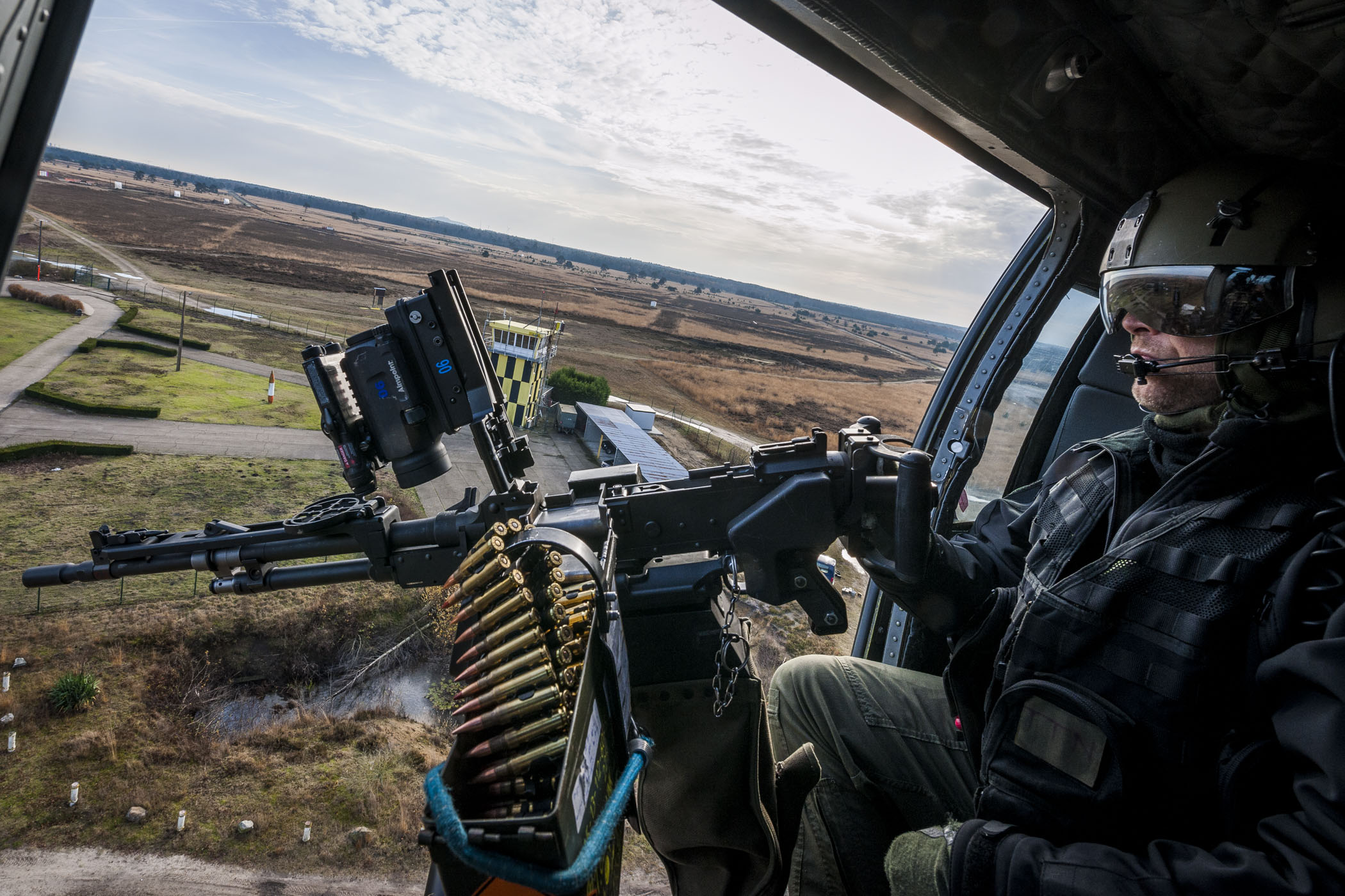 Ein "Doorgunner" im Helikopter.